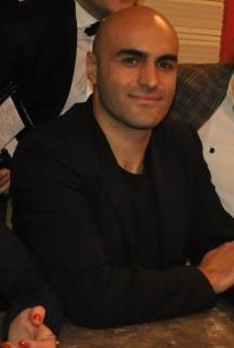 Alper Kul'un 2012'de çekilmiş bir fotoğrafı.